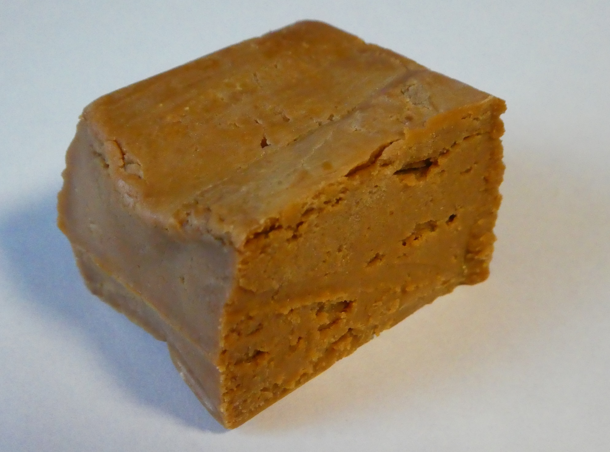 蘇 (So) の復元品。奈良県産。